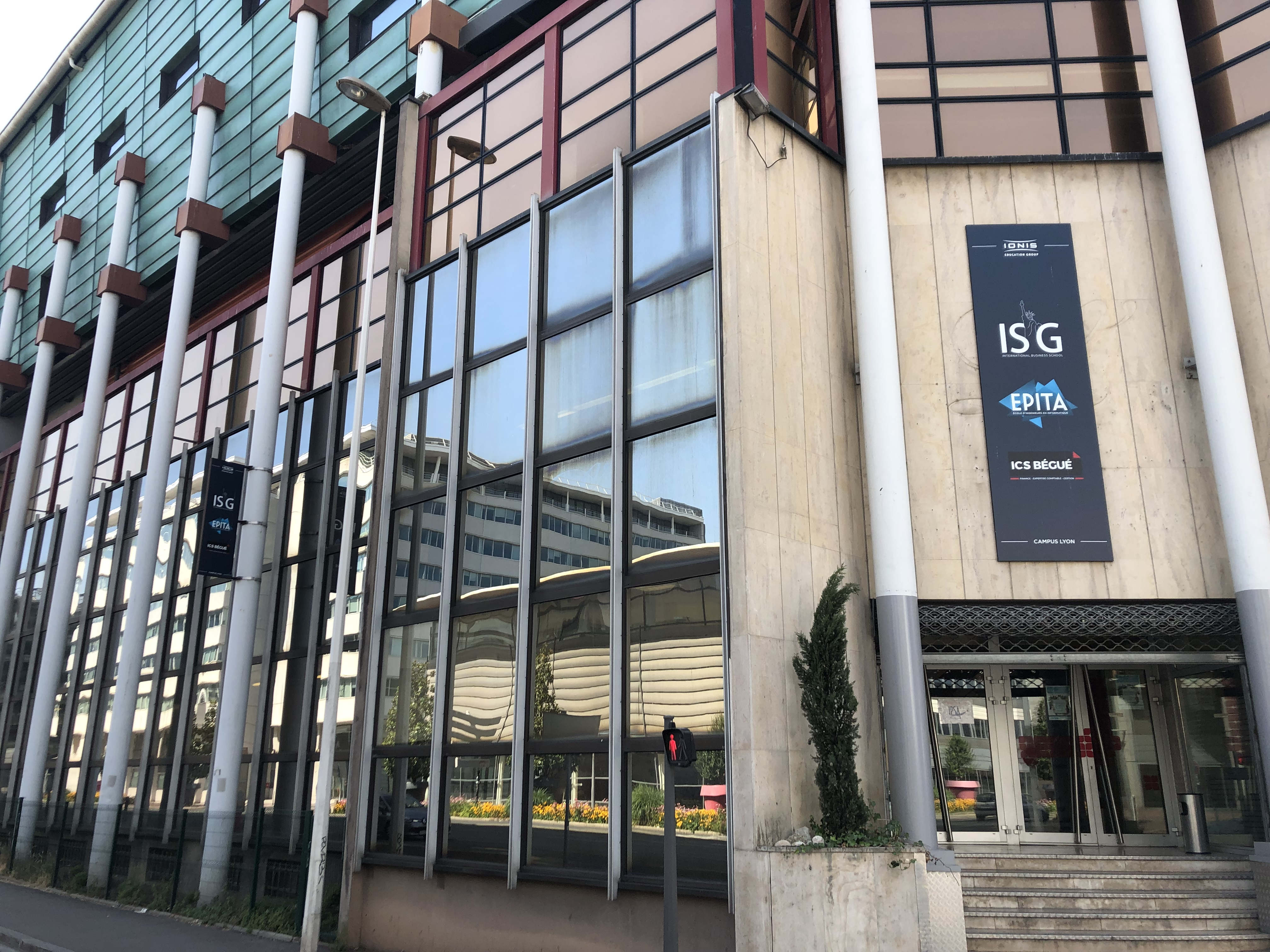 Campus de Lyon de l’IPSA (Institut polytechnique des sciences avancées), école d’ingénieurs de l’air et de l’espace (IONIS Education Group).